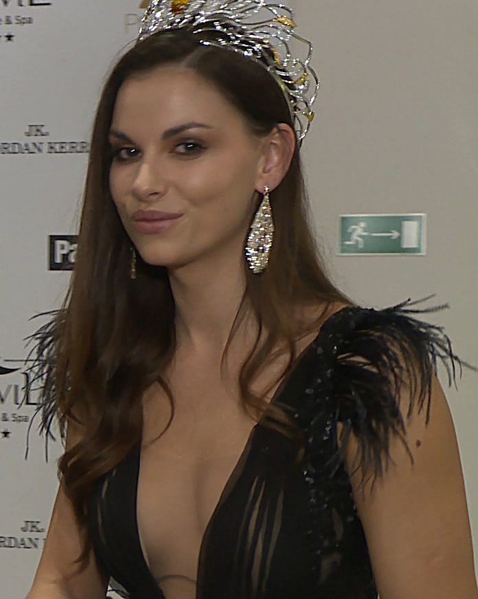 Miss Polonia 2017 Agata Biernat na gali finałowej konkursu Miss Polonia 2018 w Serocku.